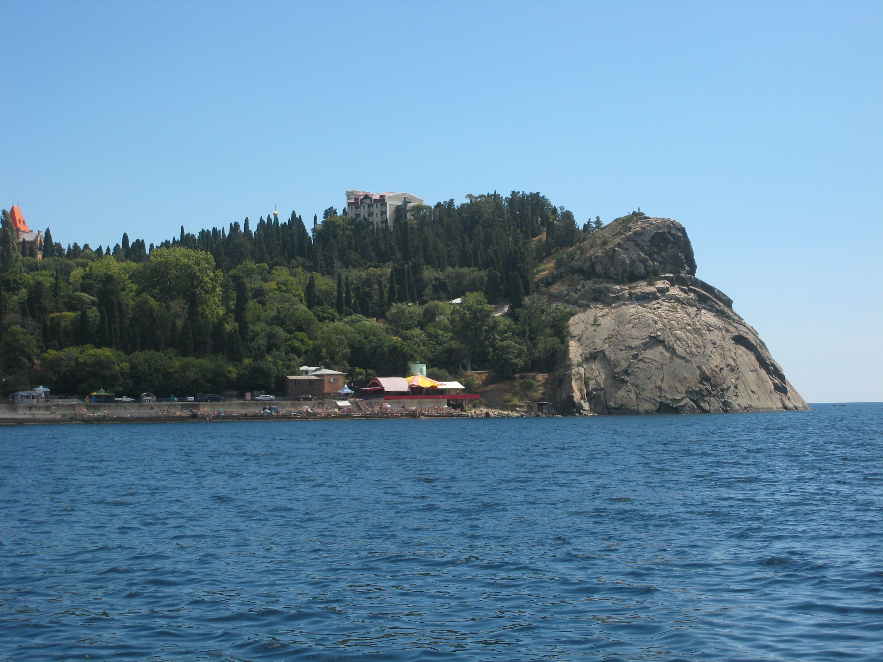 Мыс Плака, ЮБК